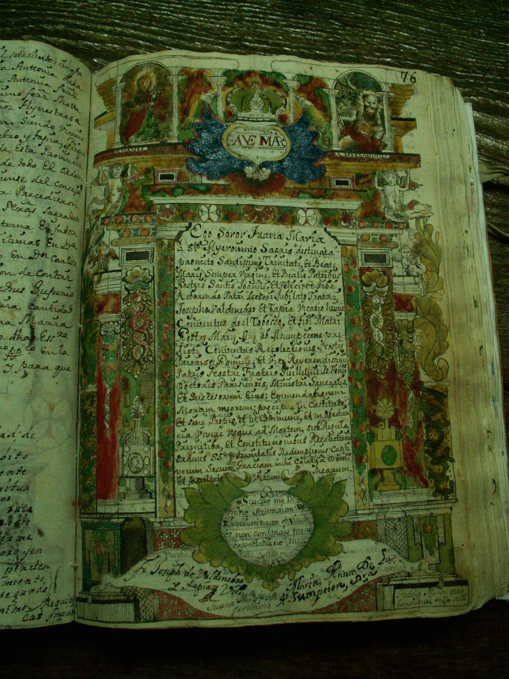 Profesión solemne de una Monja Trinitaria de El Toboso, Toledo.